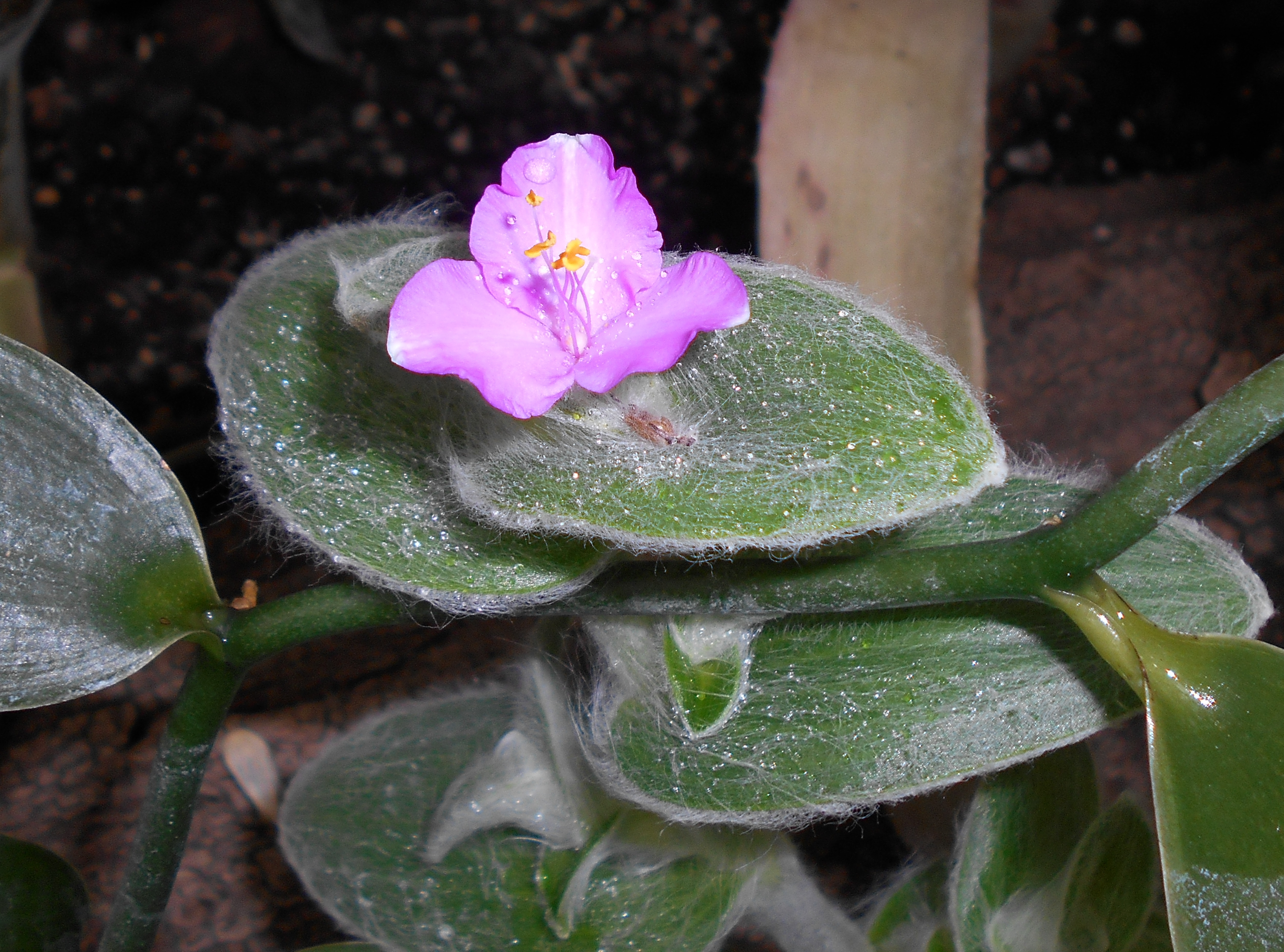 Tradescantia sillamontana, Ogród Botaniczny UMCS w Lublinie